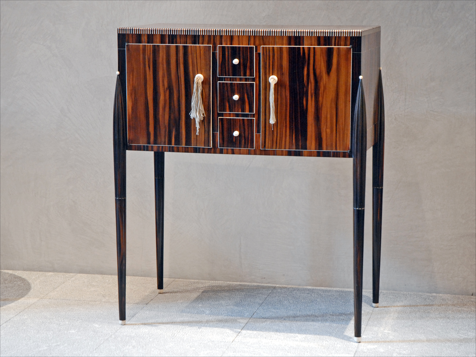 Meuble de Jacques-Emile Ruhlmann (Paris 1879-Paris 1933) Site du musée